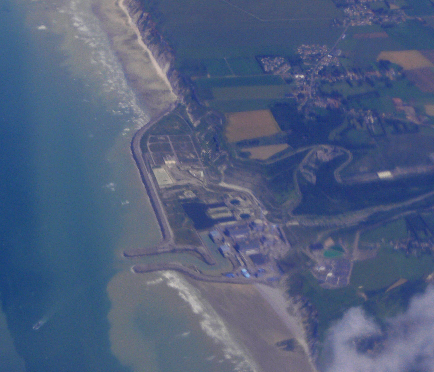 Centrale nucléaire de Penly. L'avion (de ligne) est au-dessus de Berneval-le-Grand et nous regardons vers l'est.